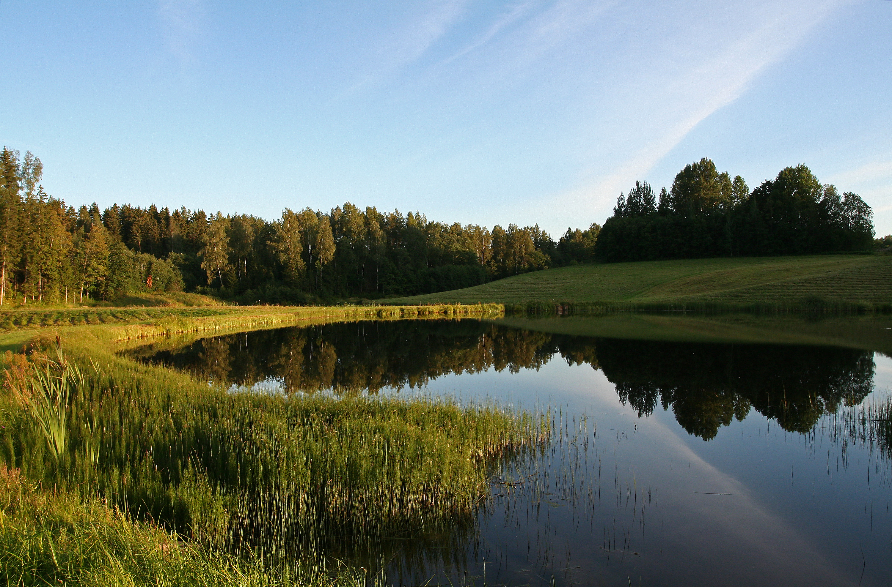 Kalda järv Haanjamaal. Mellika küla